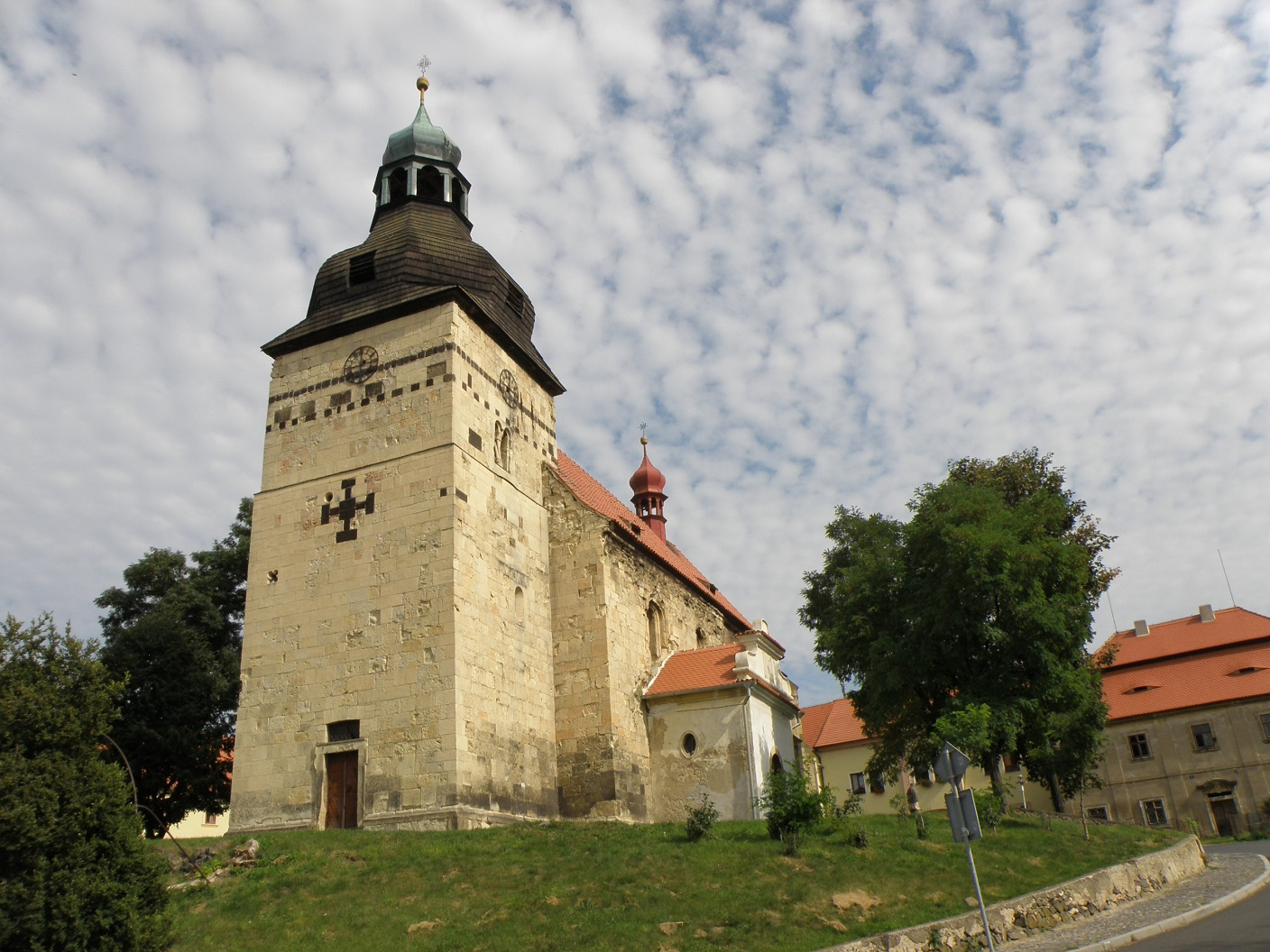 Kostel Stětí sv. Jana Křtitele (Libčeves), Libčeves